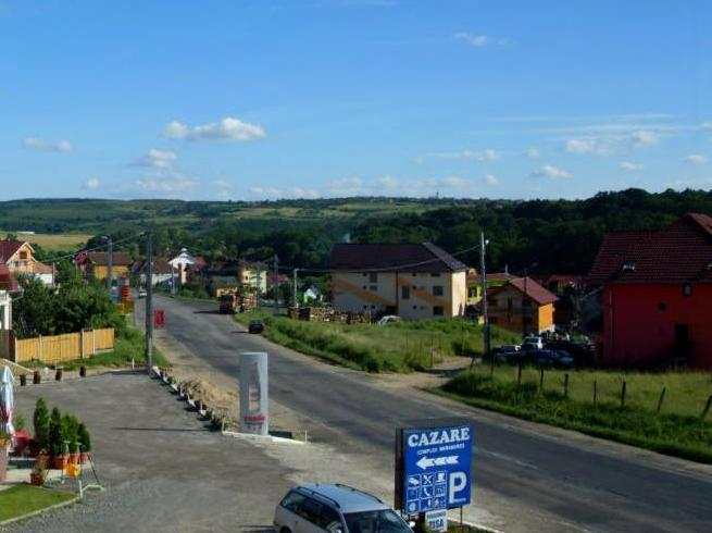 Droga krajowa nr 76 w Rumuni. Jednocześnie droga międzynarodowa E79.